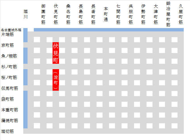 名古屋城下碁盤割模式図（伏見町・淀町位置）